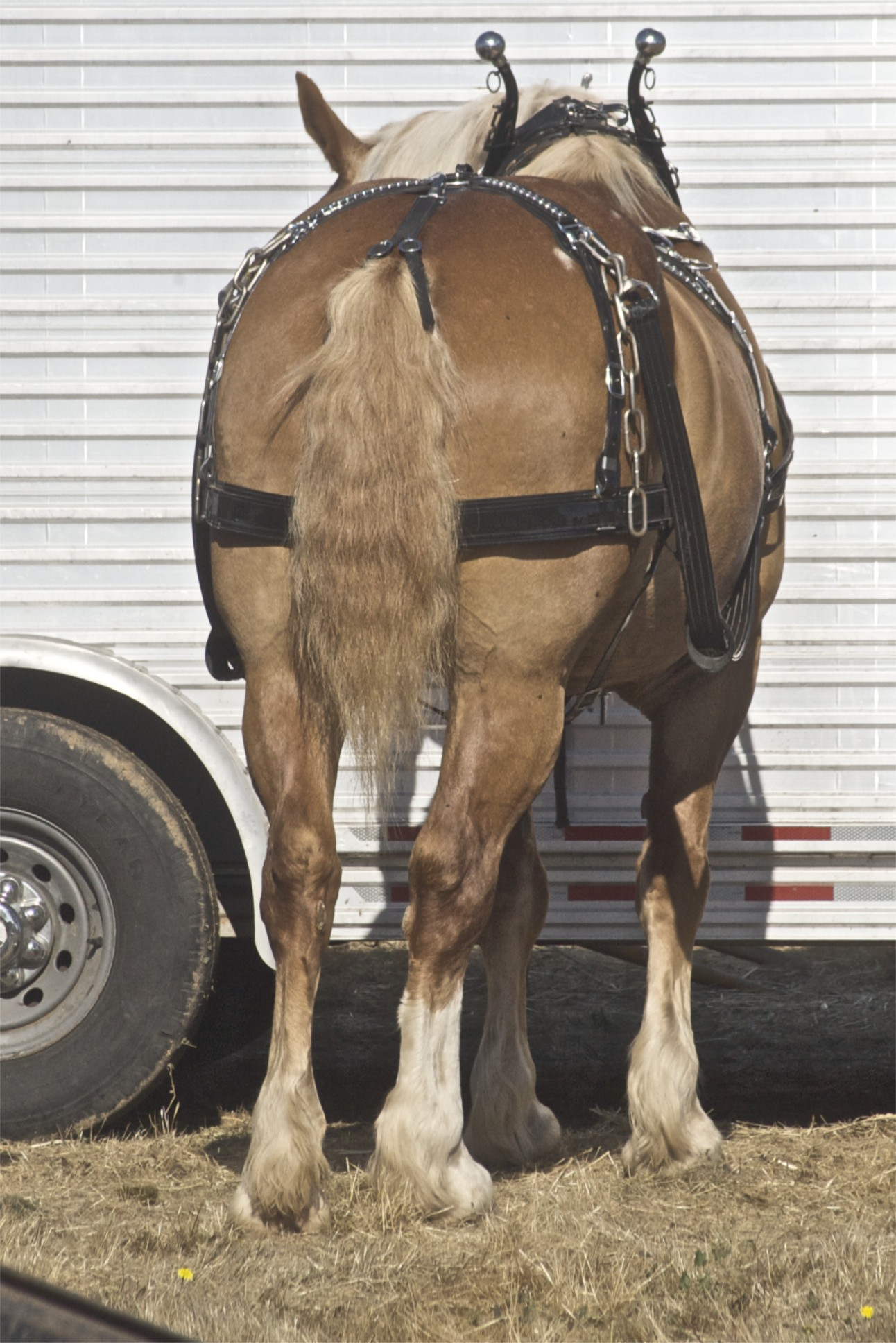 Belgian draft horse